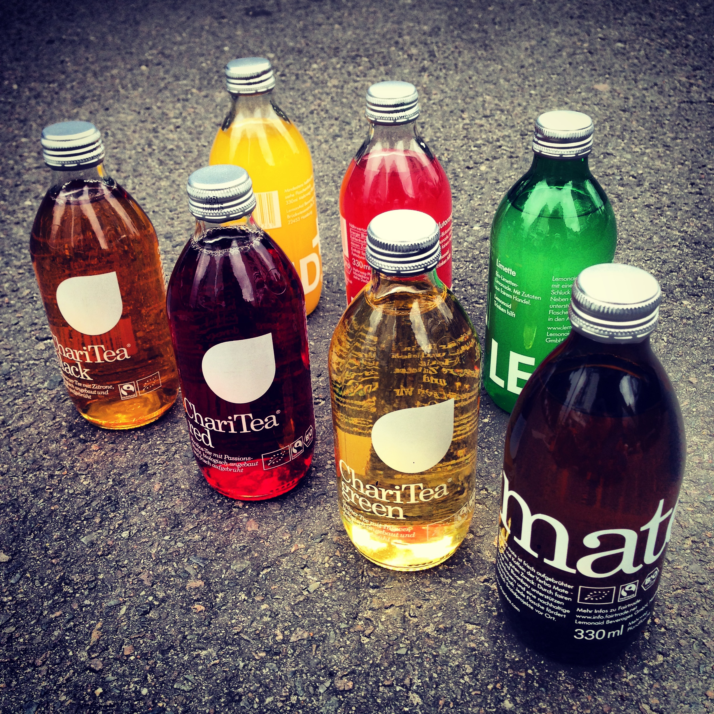 Alle Sorten der Lemonaid & ChariTea Softdrinks.